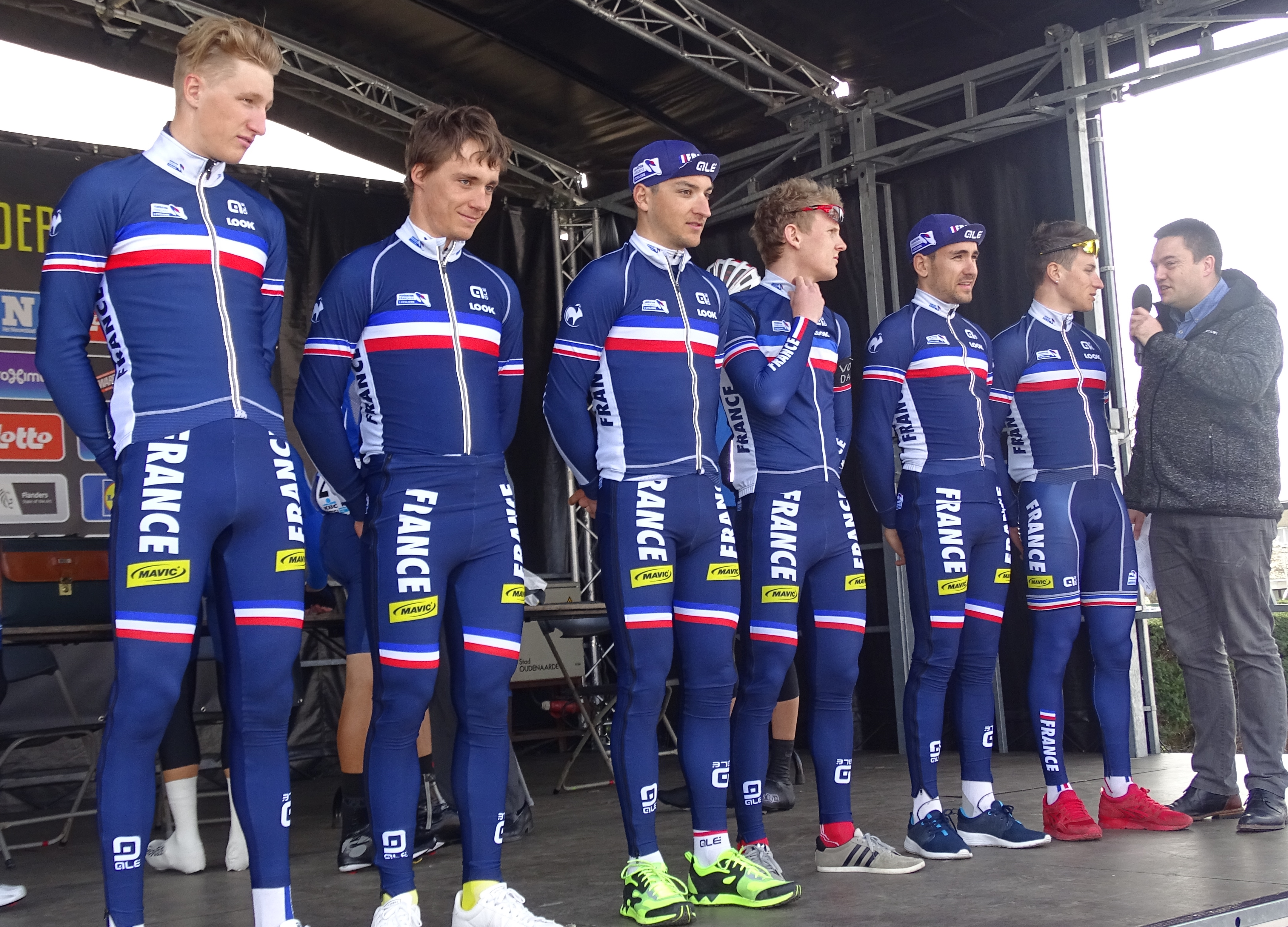 Reportage réalisé le samedi 9 avril à l'occasion du départ et de l'arrivée du Tour des Flandres espoirs 2016 à Audenarde, Belgique.